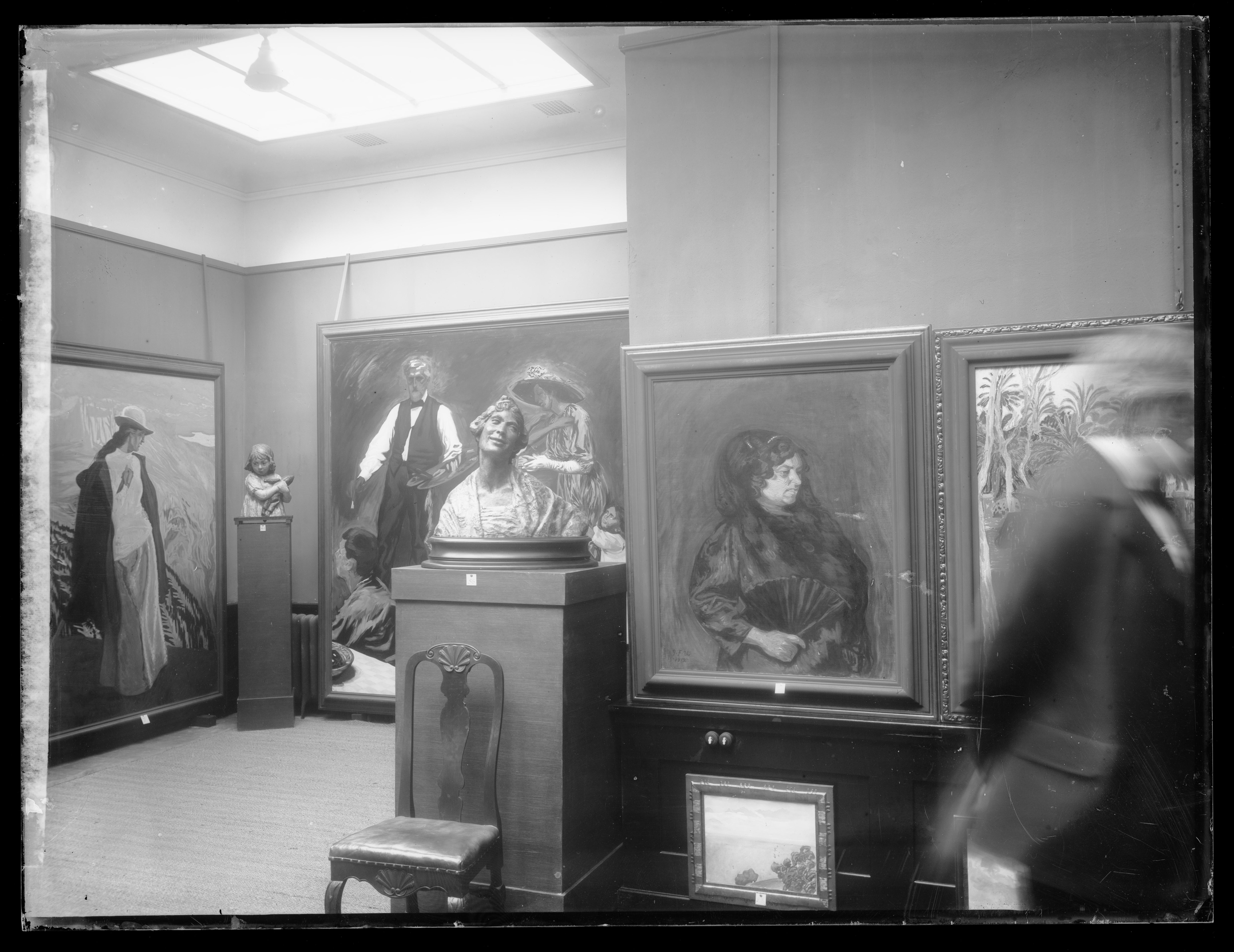 Bildet er hentet fra Nasjonalbibliotekets bildesamling. Anmerkninger til bildet var: Påskrift arkivark: Willumsens utstilling i kunstnerforbundet Eldste arkivnummer: 973 Yngre arkivnummer: 159 Oslo, Oslo, Oslo